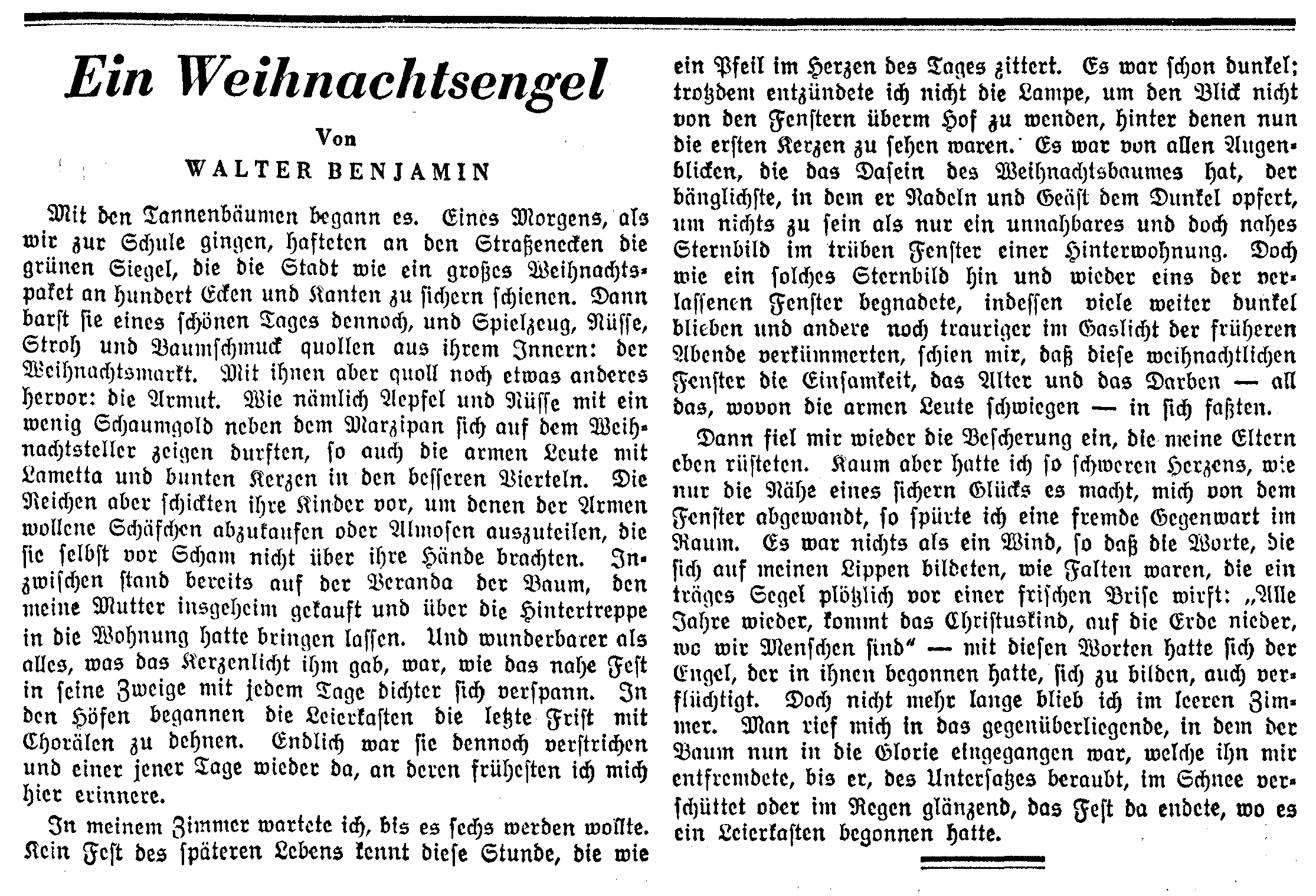 Walter Benjamin: Ein Weihnachtsengel. In: Das Unterhaltungsblatt der Vossischen Zeitung, Nr. 357, vom 24. Dezember 1932, Seite 1